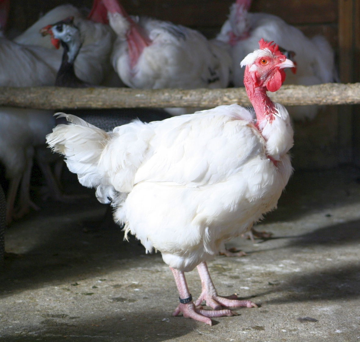 Poule Cou nu du Forez présentée dans le parc du Château de Bouthéon (Loire)